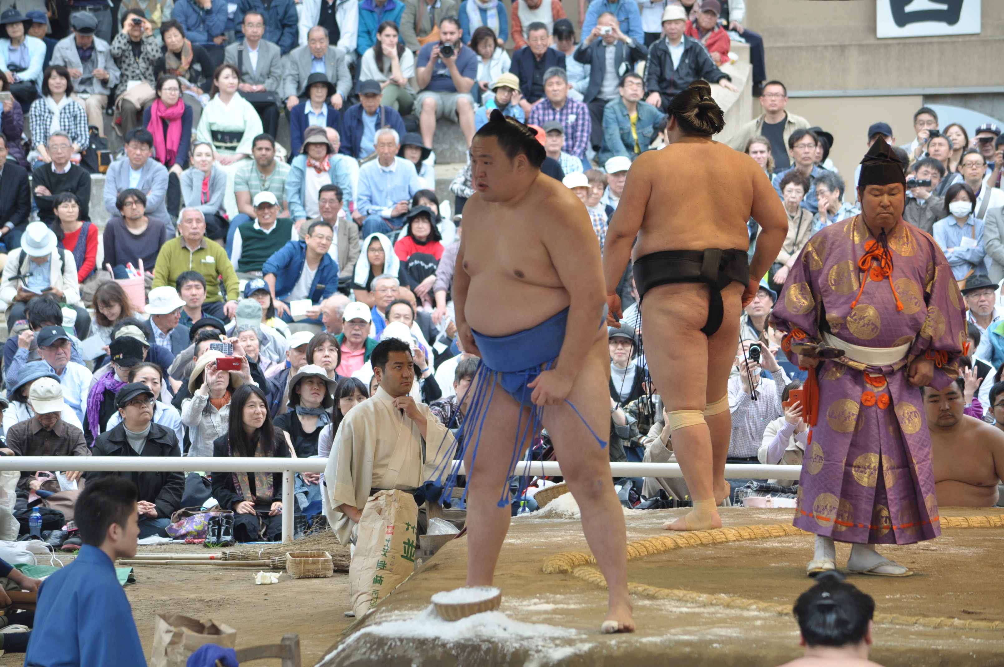 玉鷲 一朗